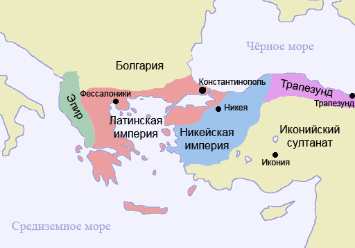 Русифицированная версия File:Byzantium1204.png.